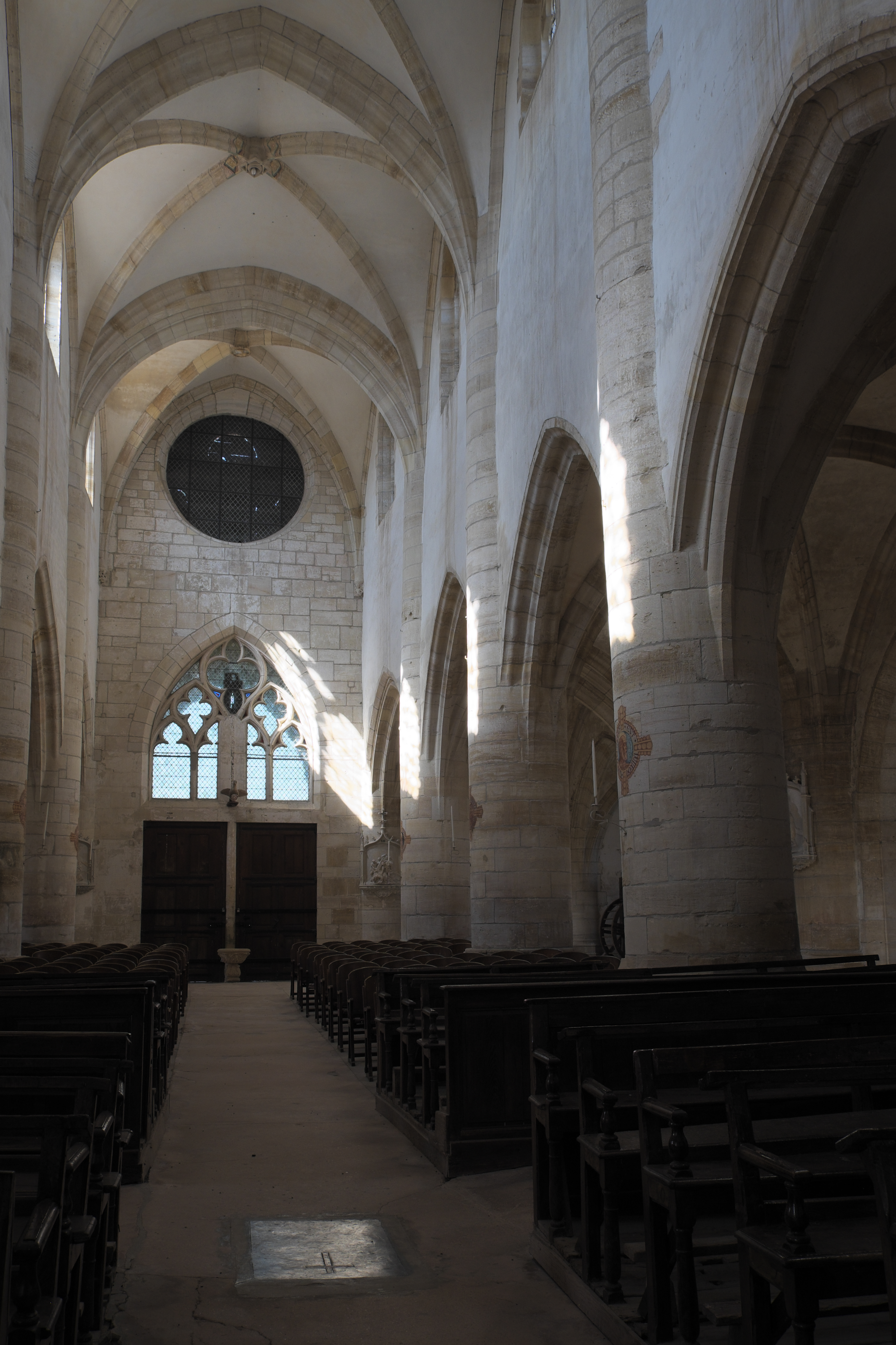 Katholische Kirche Saint-Louvent in Rembercourt-Sommaisne im Département Meuse (Lothringen) (Region Grand Est/Frankreich), Innenraum